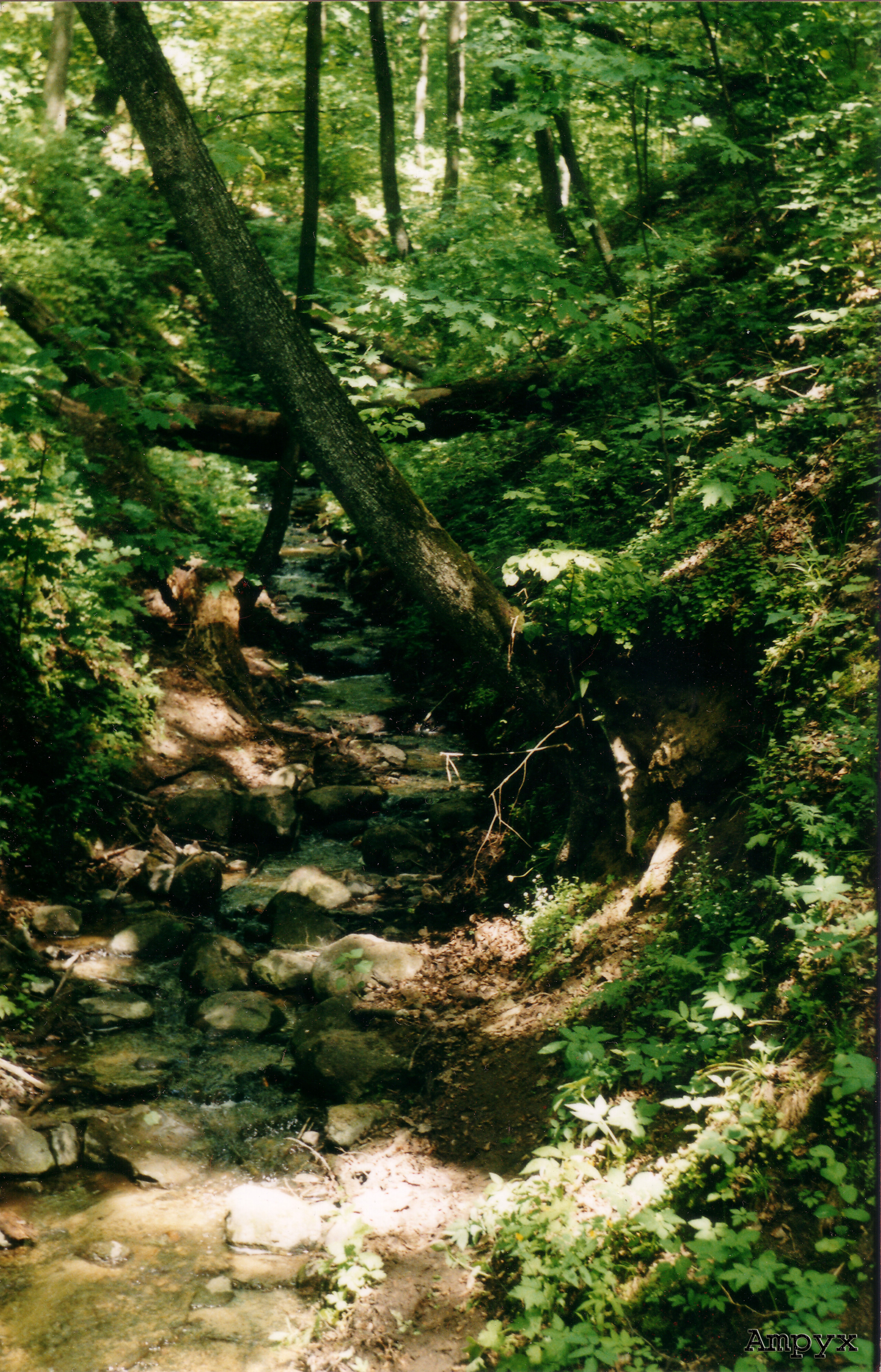 Leipalingio parkas, 2001